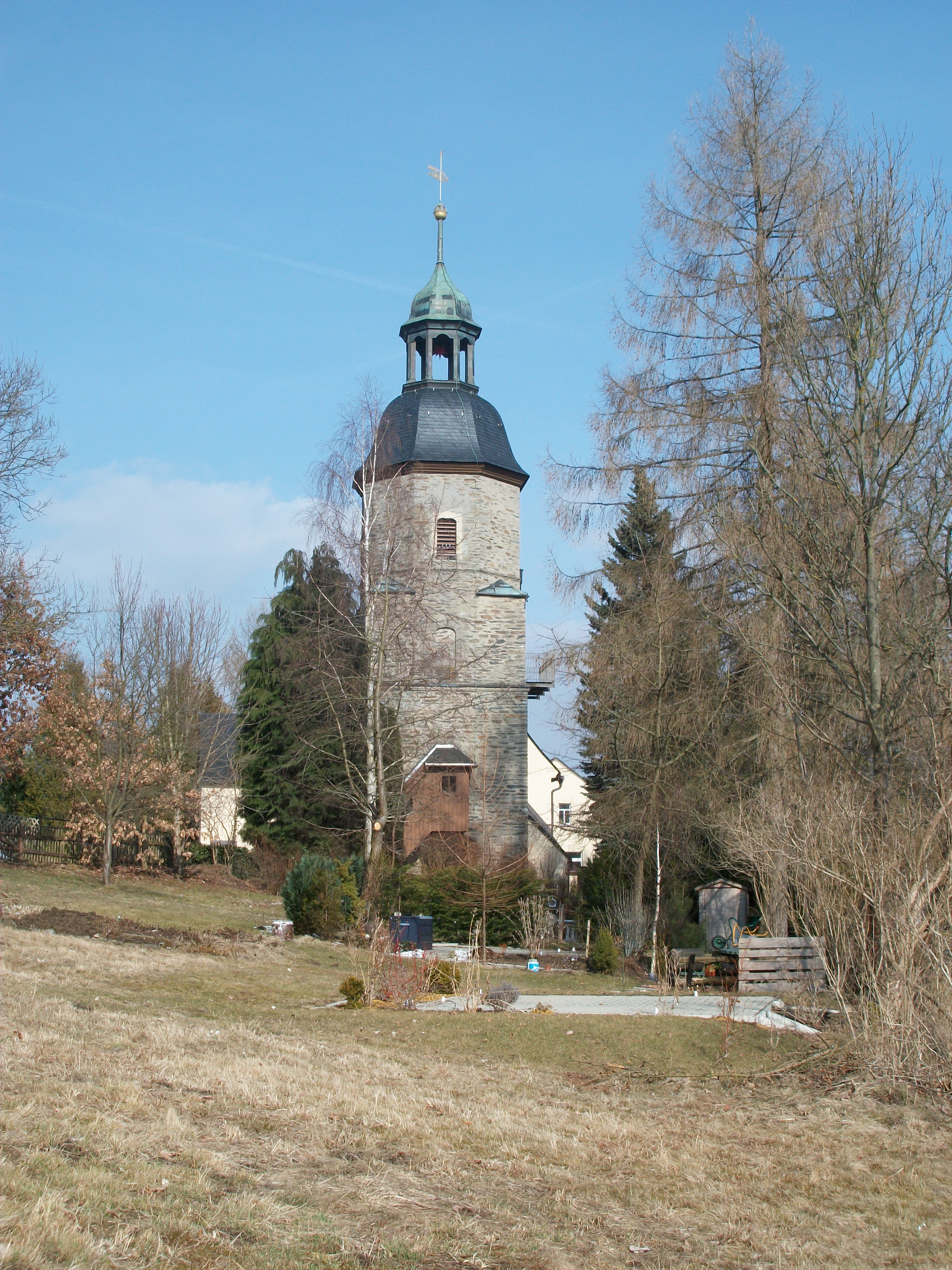 Kirche Tannenberg, Turm